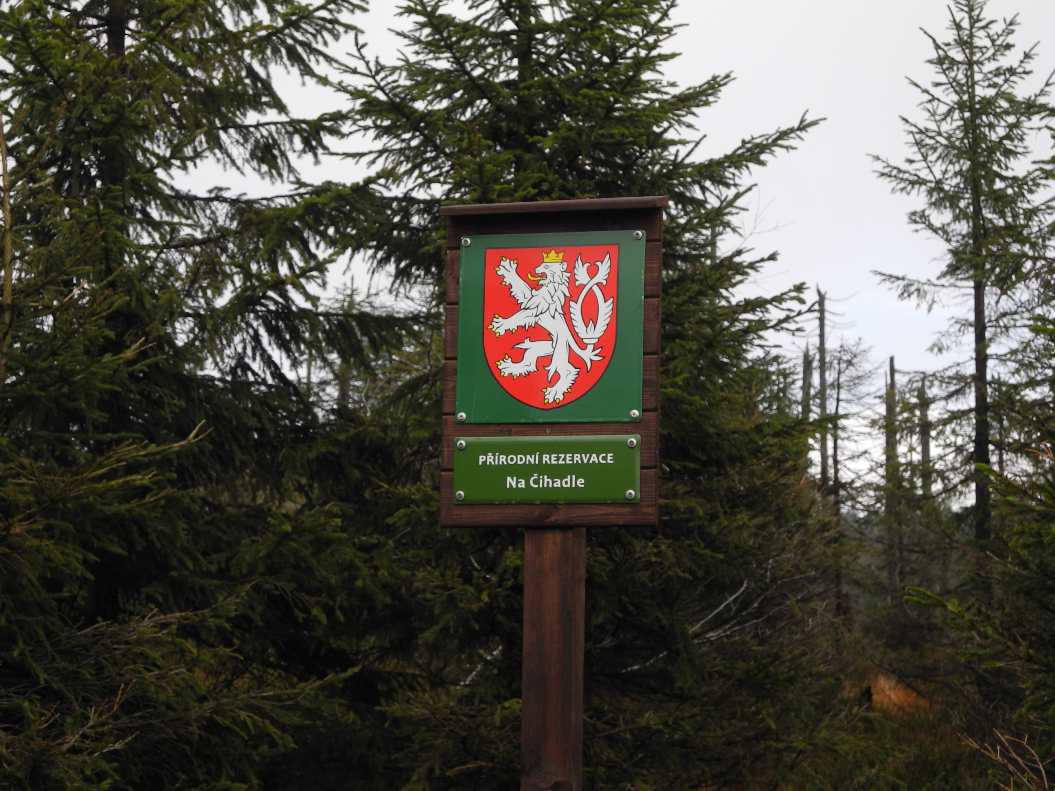 Označení PR